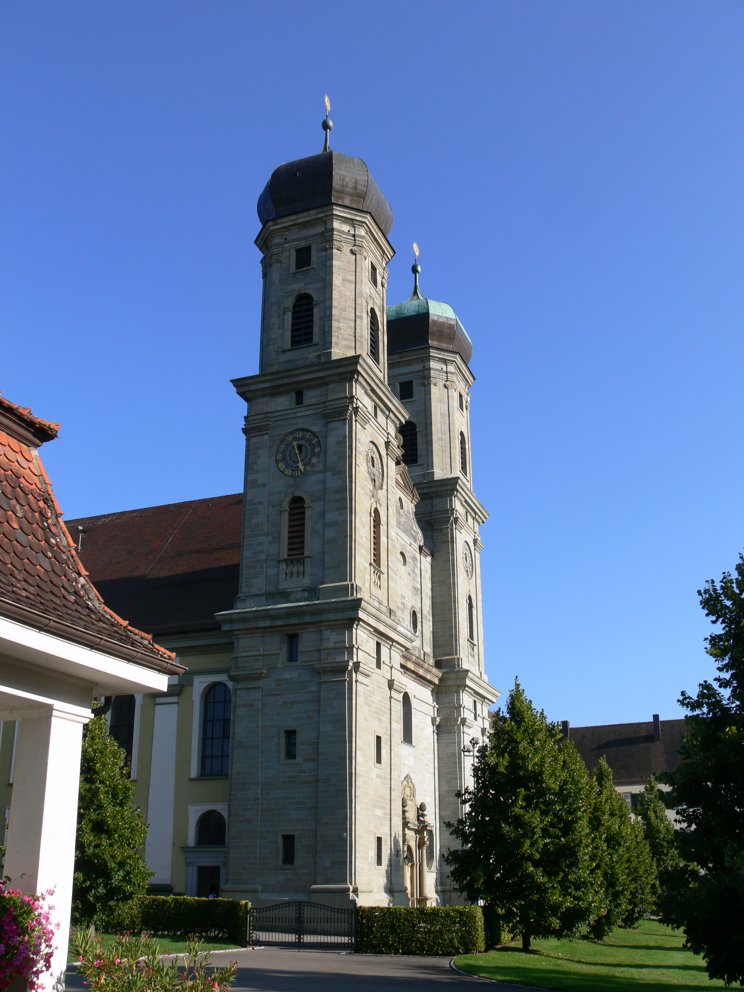 Schlosskirche Friedrichshafen (ehem. Klosterkirche Hofen)